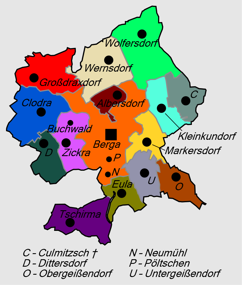 Gliederung der Stadt Berga/Elster ab 7. Oktober 1949